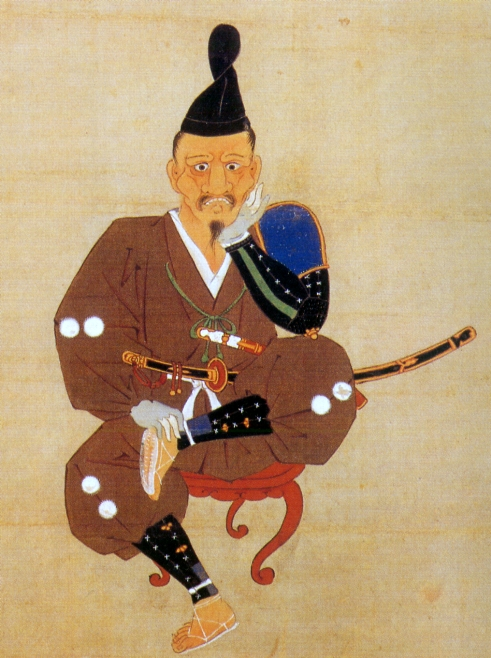 徳川家康。画名「徳川家康三方ヶ原戦役画像」 Tokugawa Ieyasu Mikatagahara Seneki Gazou . 別名「顰み（しかみ）像」 三方が原の戦いにおいて、武田信玄率いる武田軍に敗れたあと、その経験を忘れないように描かせた肖像画。